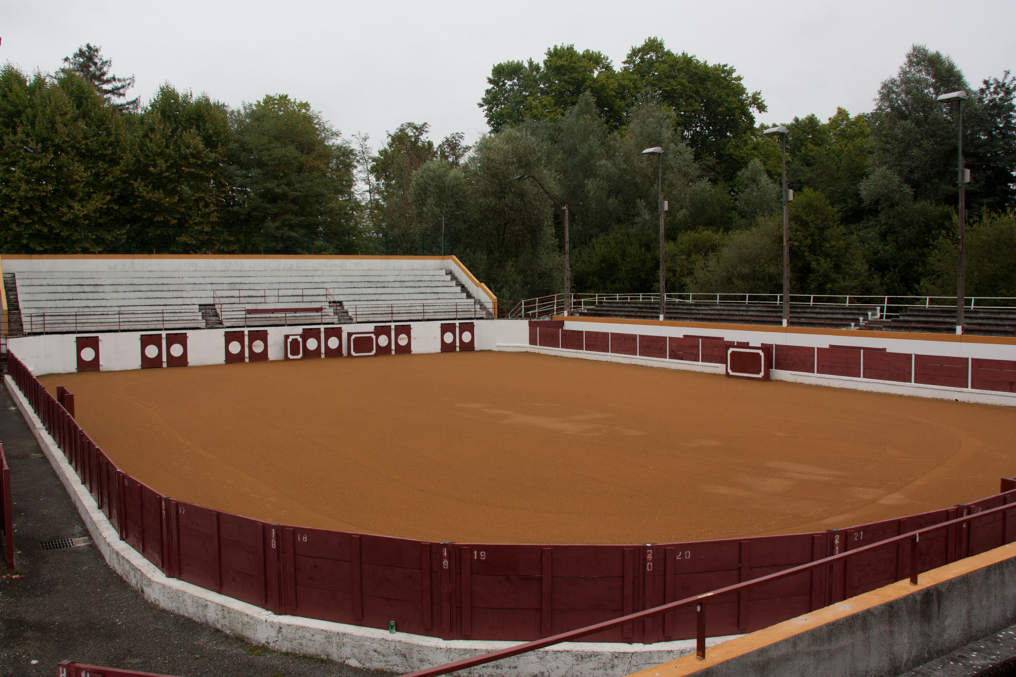 Les arènes, Maubourguet, Hautes-Pyrénées, France